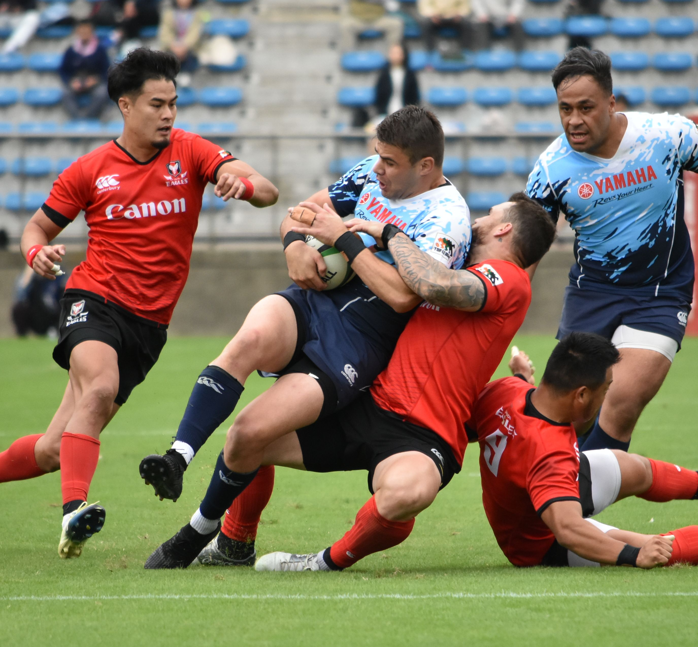 マット・マッガーン